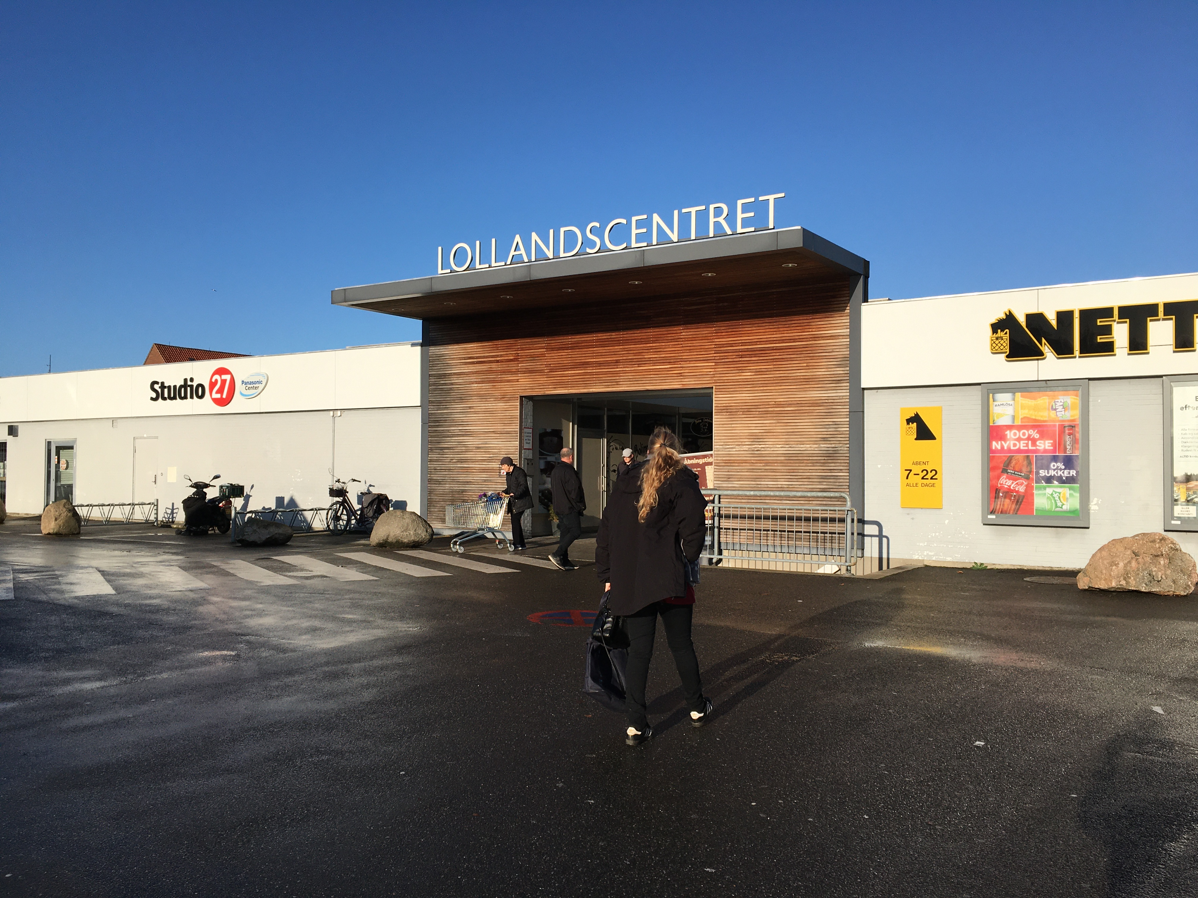 Lollandscentret i Maribo, 2020